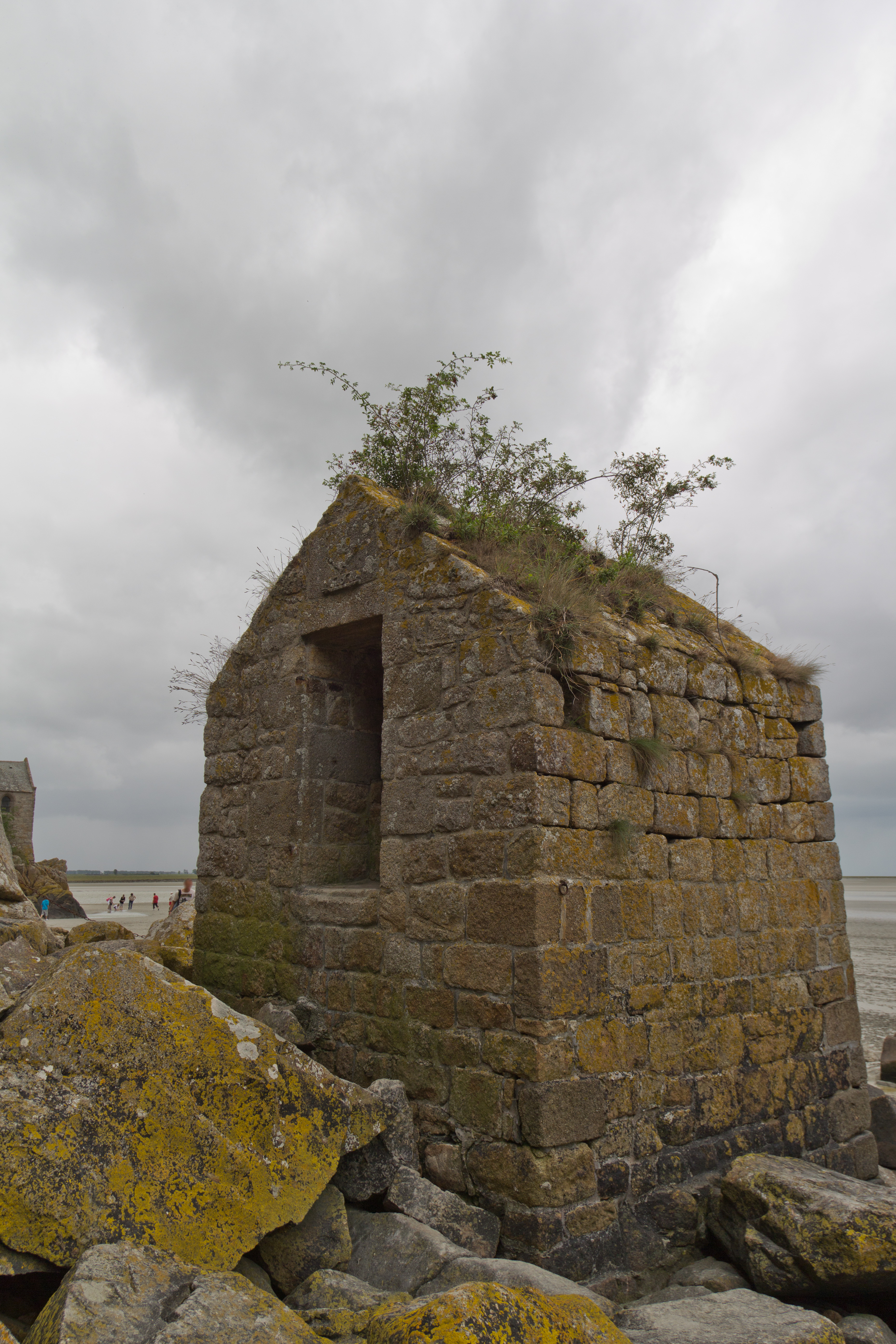 La façade de la fontaine comporte une ouverture ouvrant sur un puits aujourd'hui comblé.